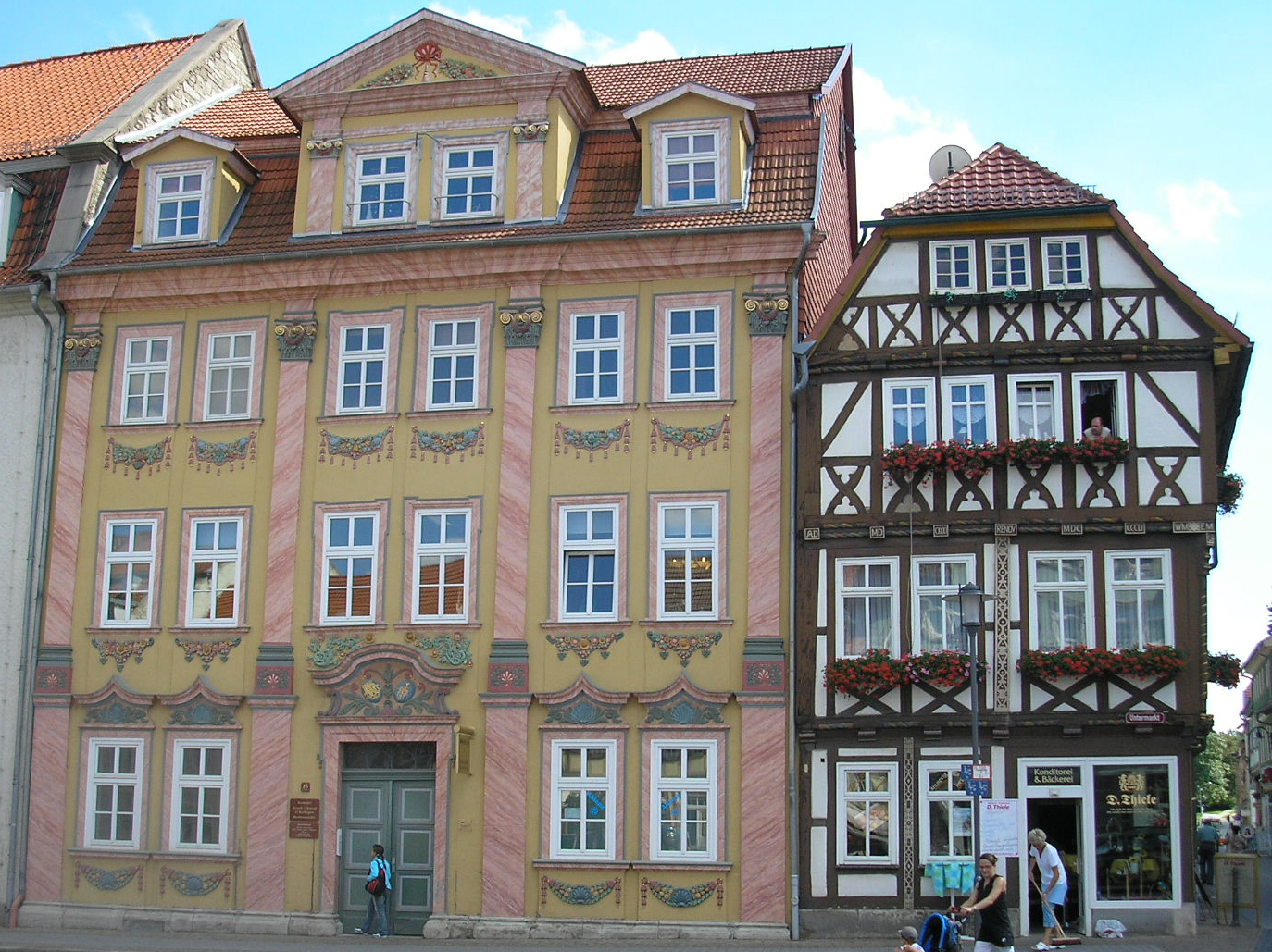 Häuser am Untermarkt in Mühlhausen (Thüringen).